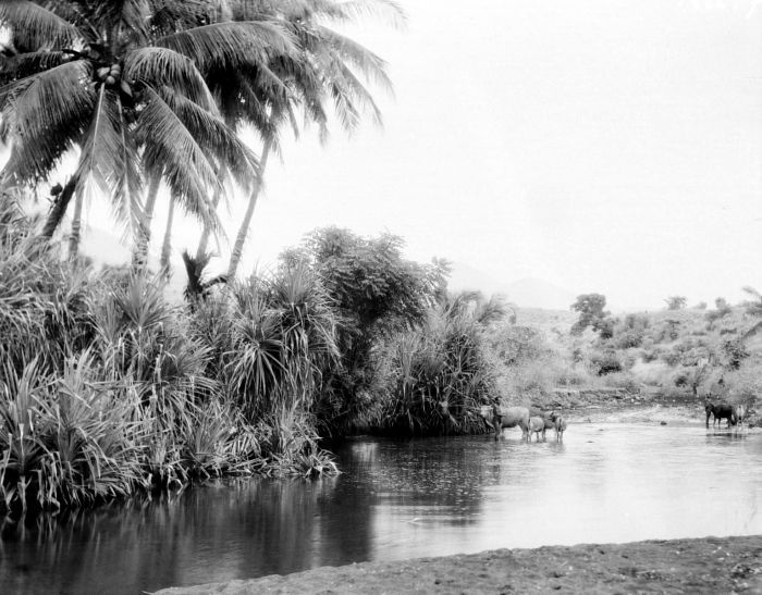 Negatief. Runderen in een lagune bij Koeboe